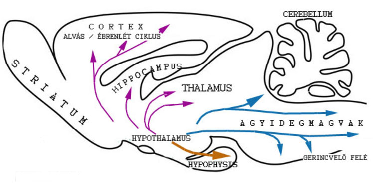 Orexinerg